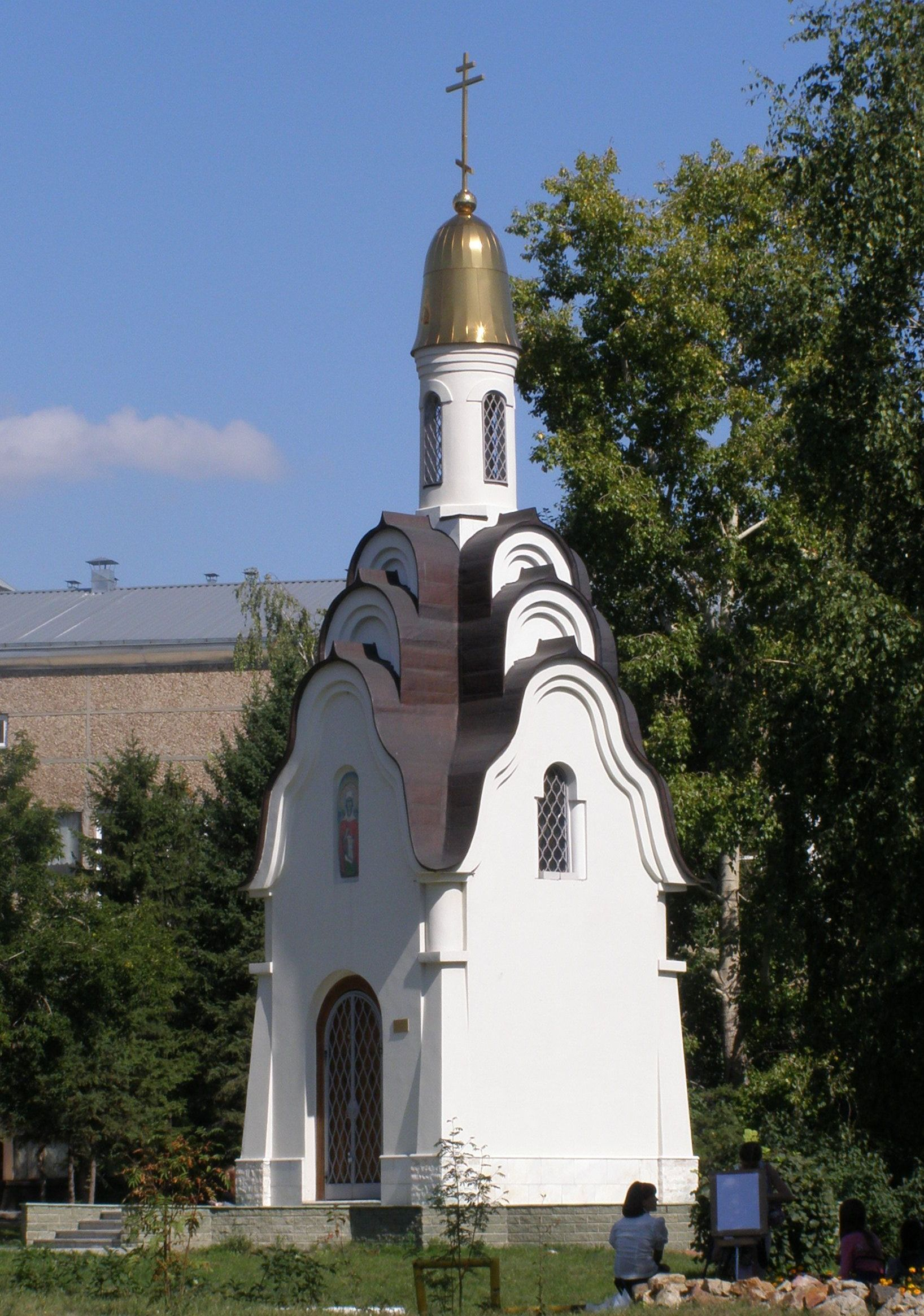 Часовня Святой мученицы Татьяны (Барнаул)